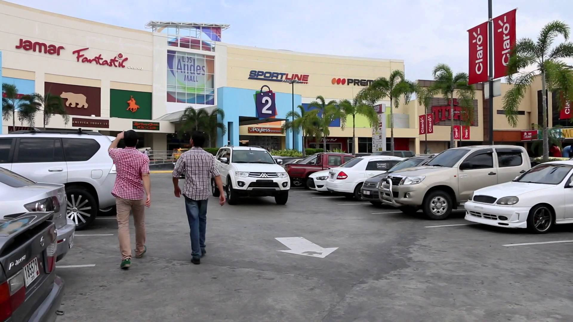 Los Andes Mall. Ubicado en Belisario Porras.